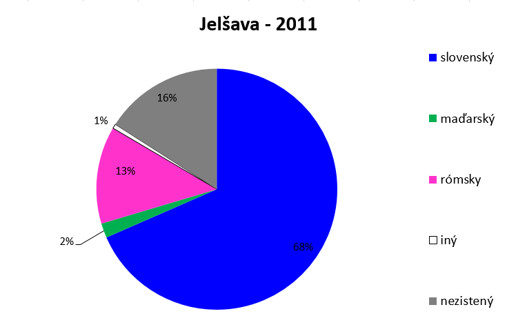 materinský jazyk obyvateľstva